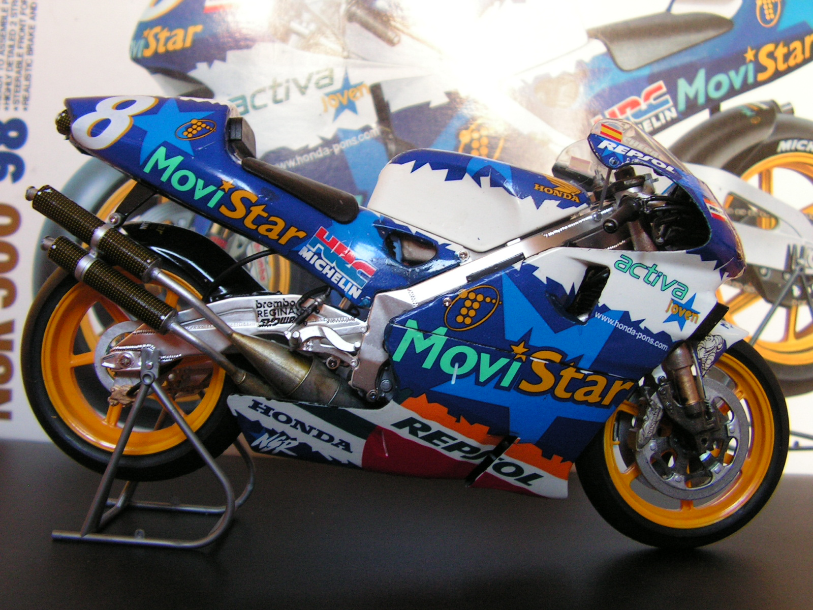 maquette 1/24 NSR 500 Carlos Checa